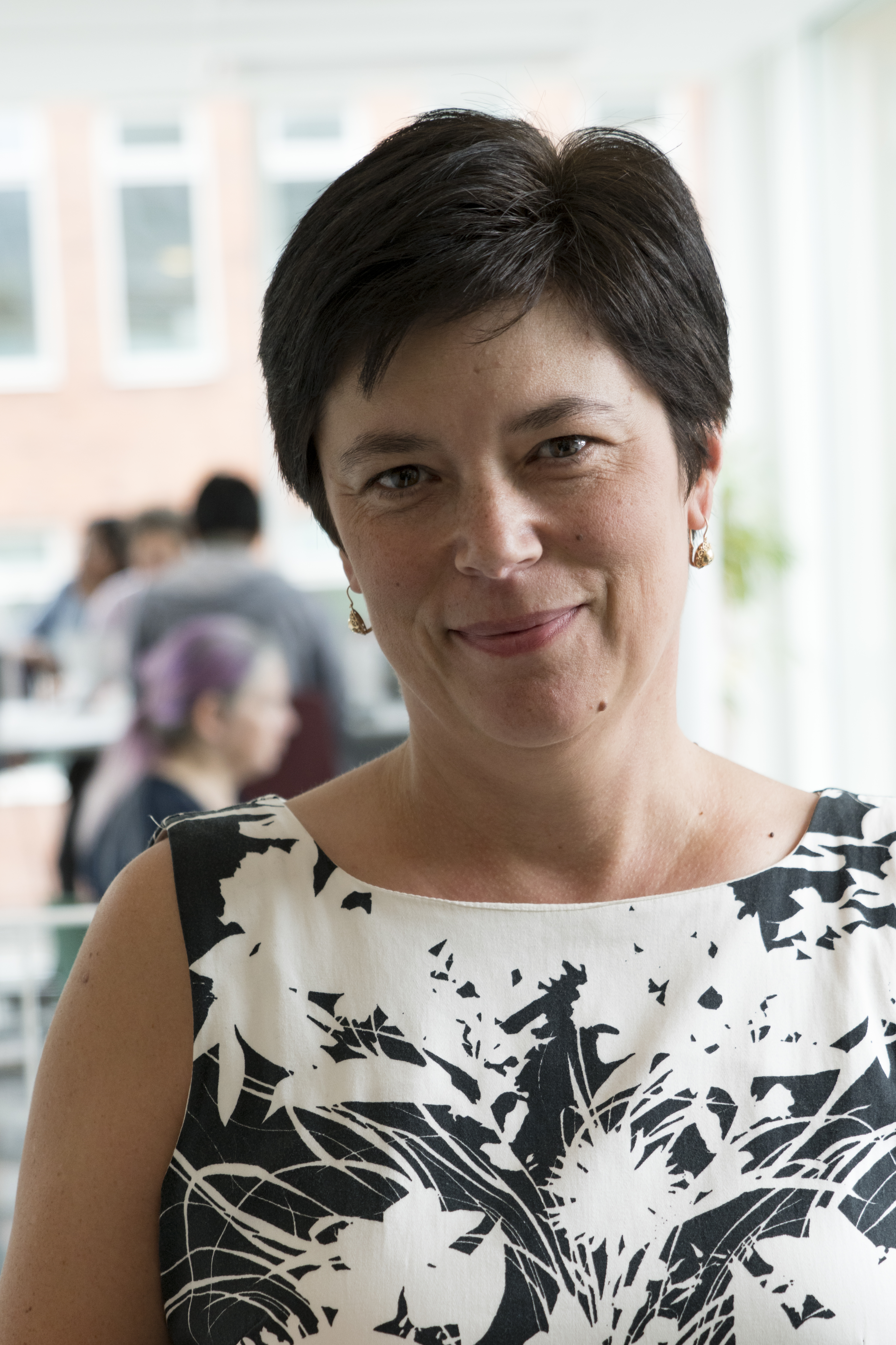 Tünde Fülöp är forskare på Chalmers